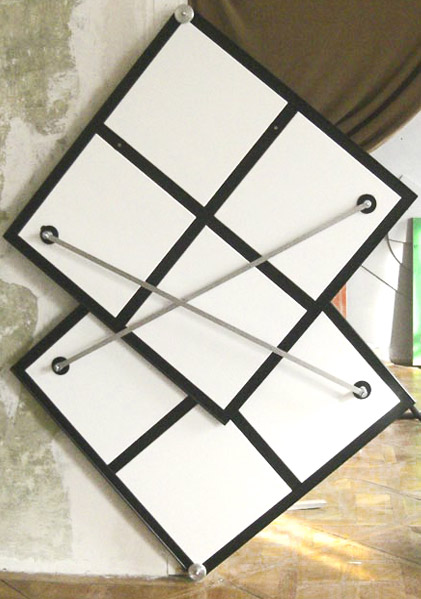 Foto von einer Drehplattentür, Klemens Torggler